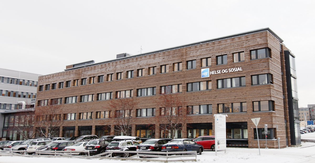 Bygningen der NTNU UB Tungasletta holder til